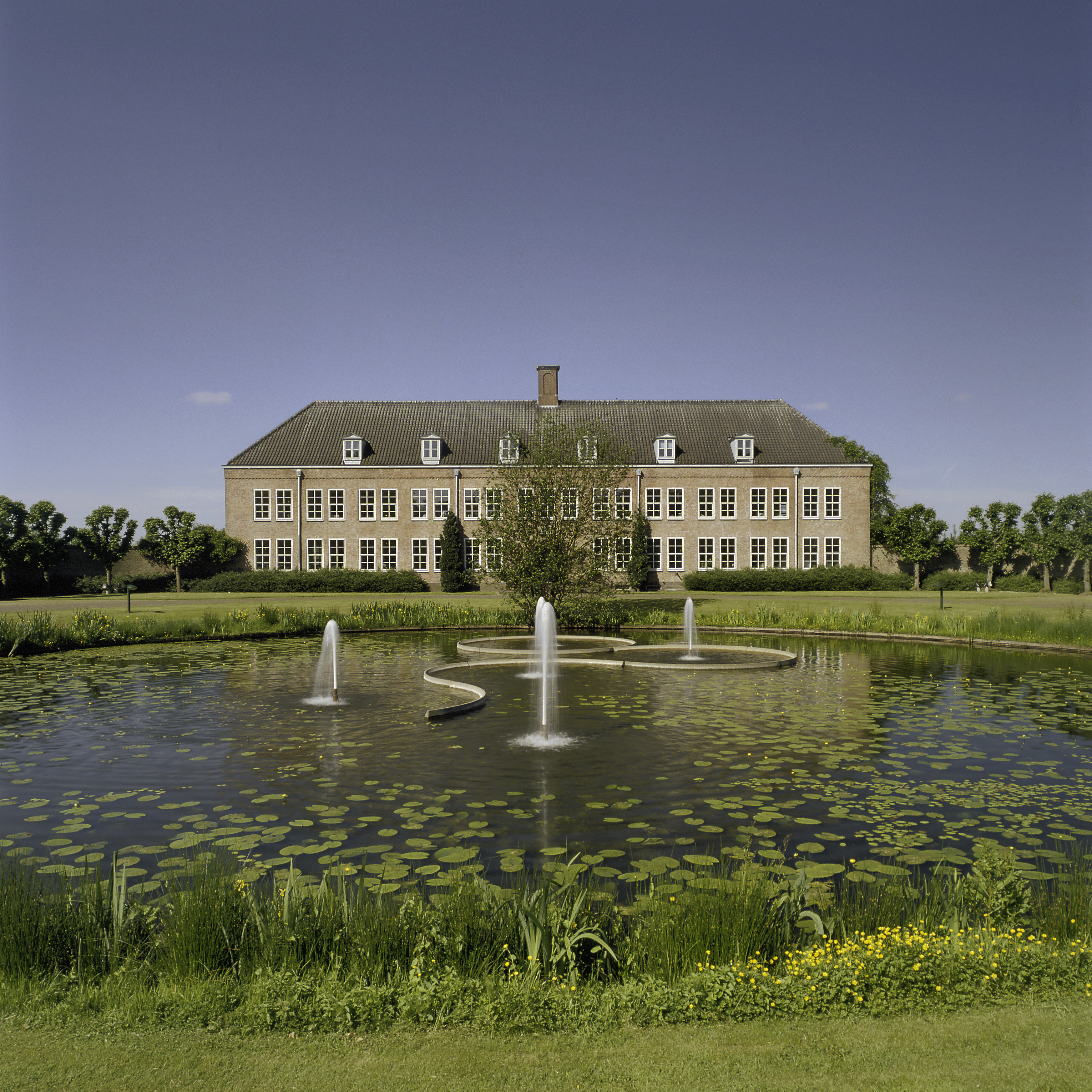 Rijksinsituut voor Rassenonderzoek van Culuurgewassen: Overzicht van de voorgevel van het hoofdgebouw, vijver met fonteinen op de voorgrond (opmerking: Gefotografeerd voor Monumenten van Herrezen Nederland, bladzijde 54)